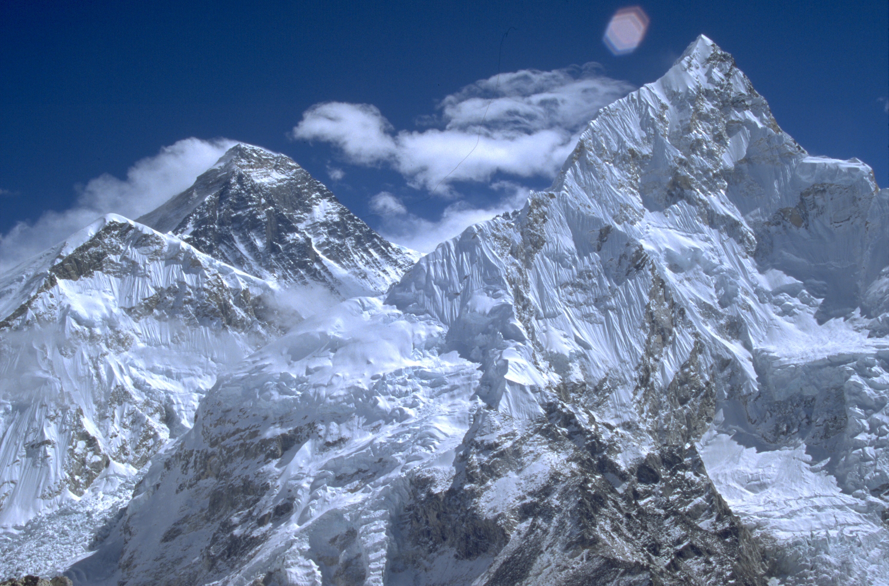 Everest (29,035 ft) and Nuptse (+25,000 ft)